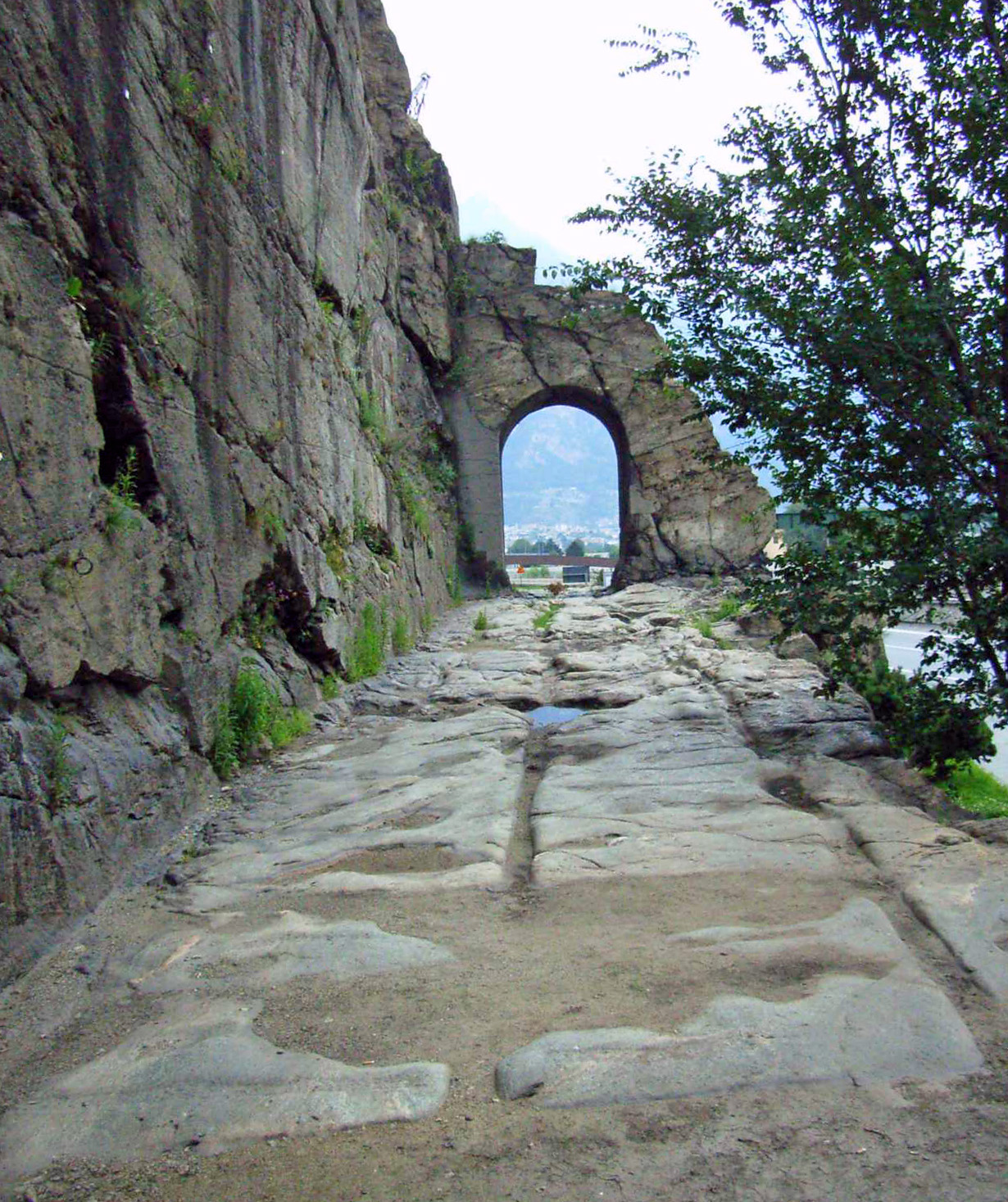 Römisches Straßenfragment bei Donnas (Aoste)